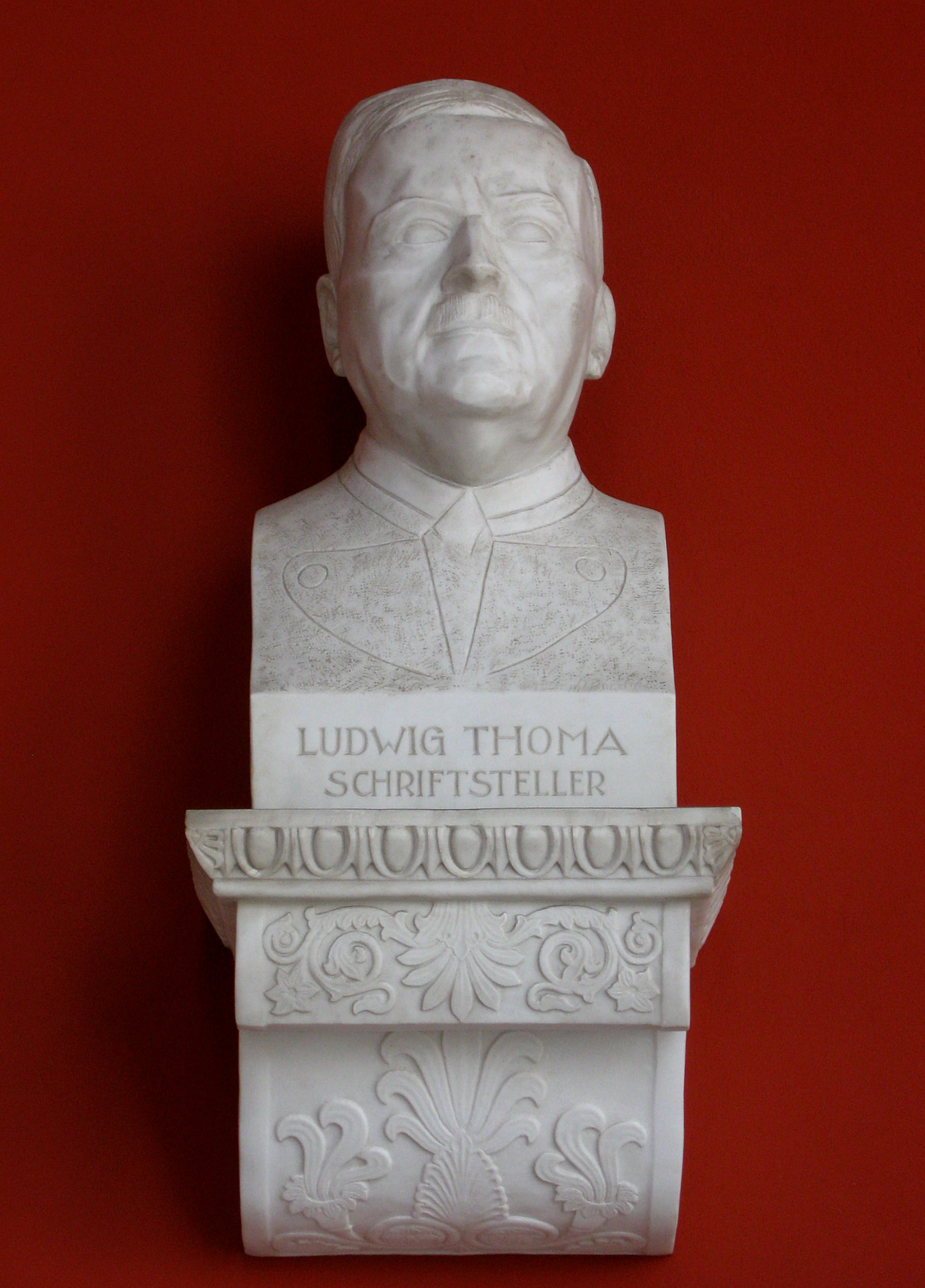 Theresienhöhe 16; Ruhmeshalle, dreiflügelige, dorische Ruhmeshalle mit Büsten verdienter Bayern, 1843–53 von Leo von Klenze. Ludwig Thoma, Schriftsteller